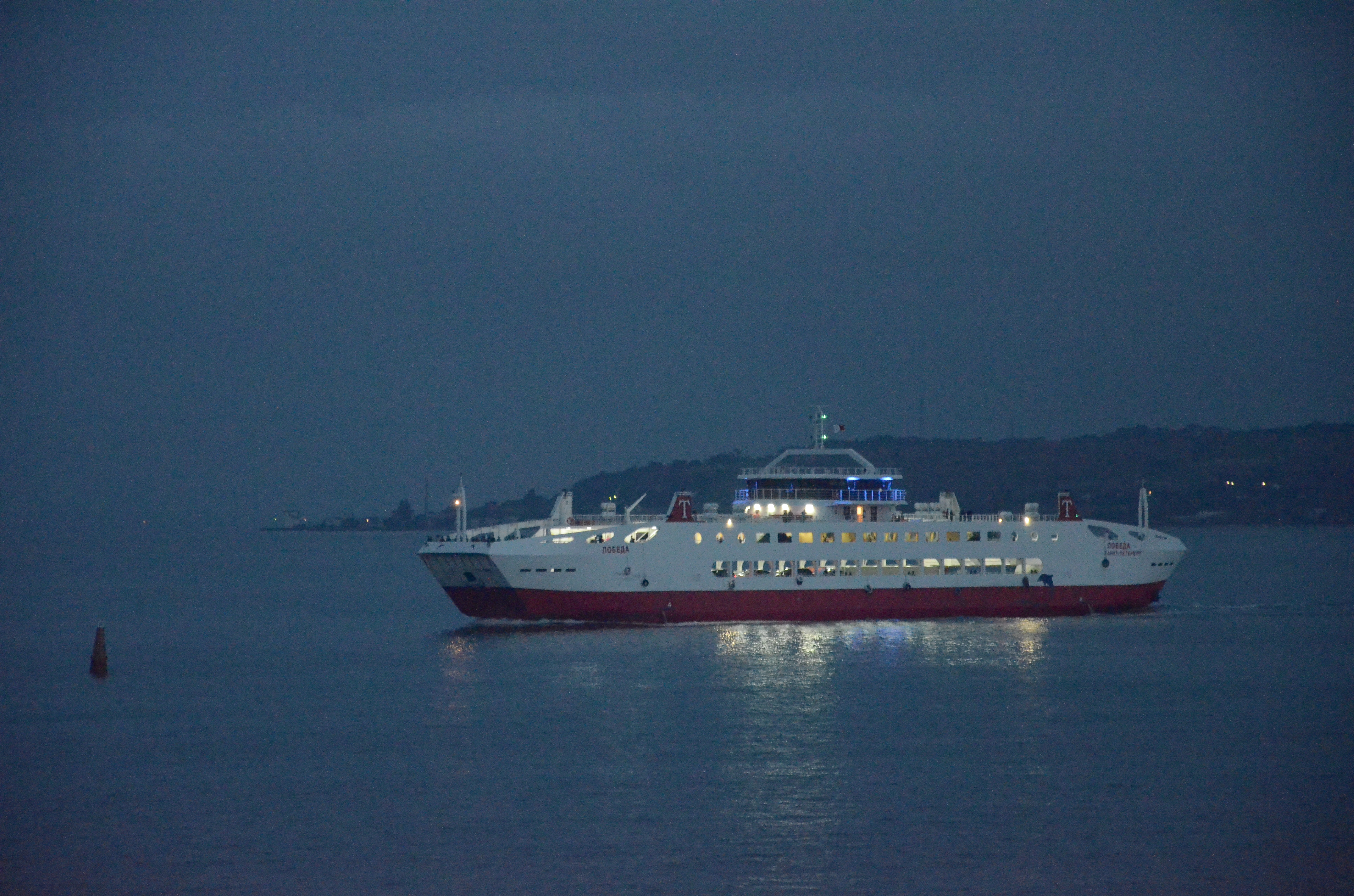 Керченская паромная переправа